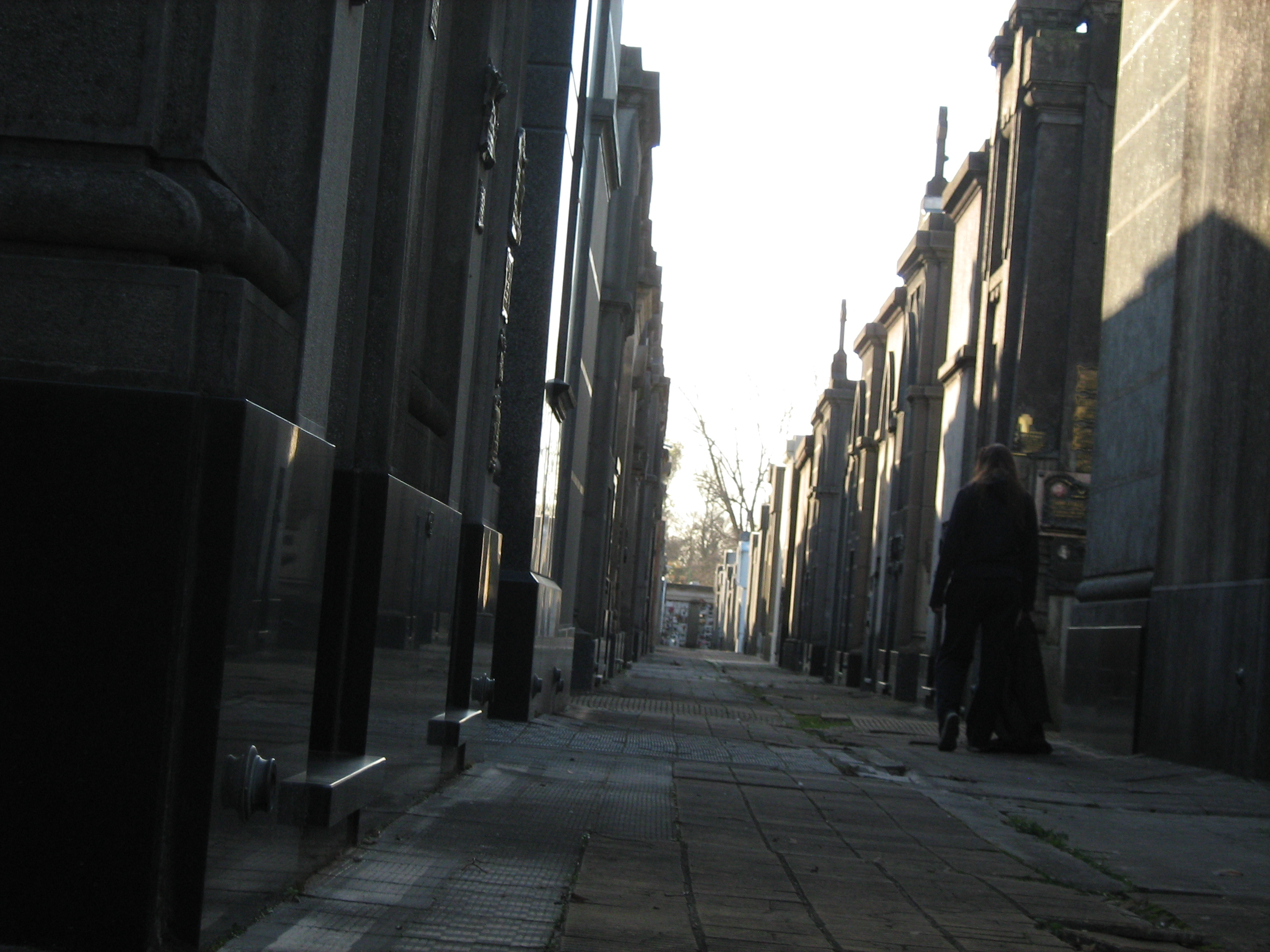 Foto tomada en el Cementerio de la Ciudad de La Plata